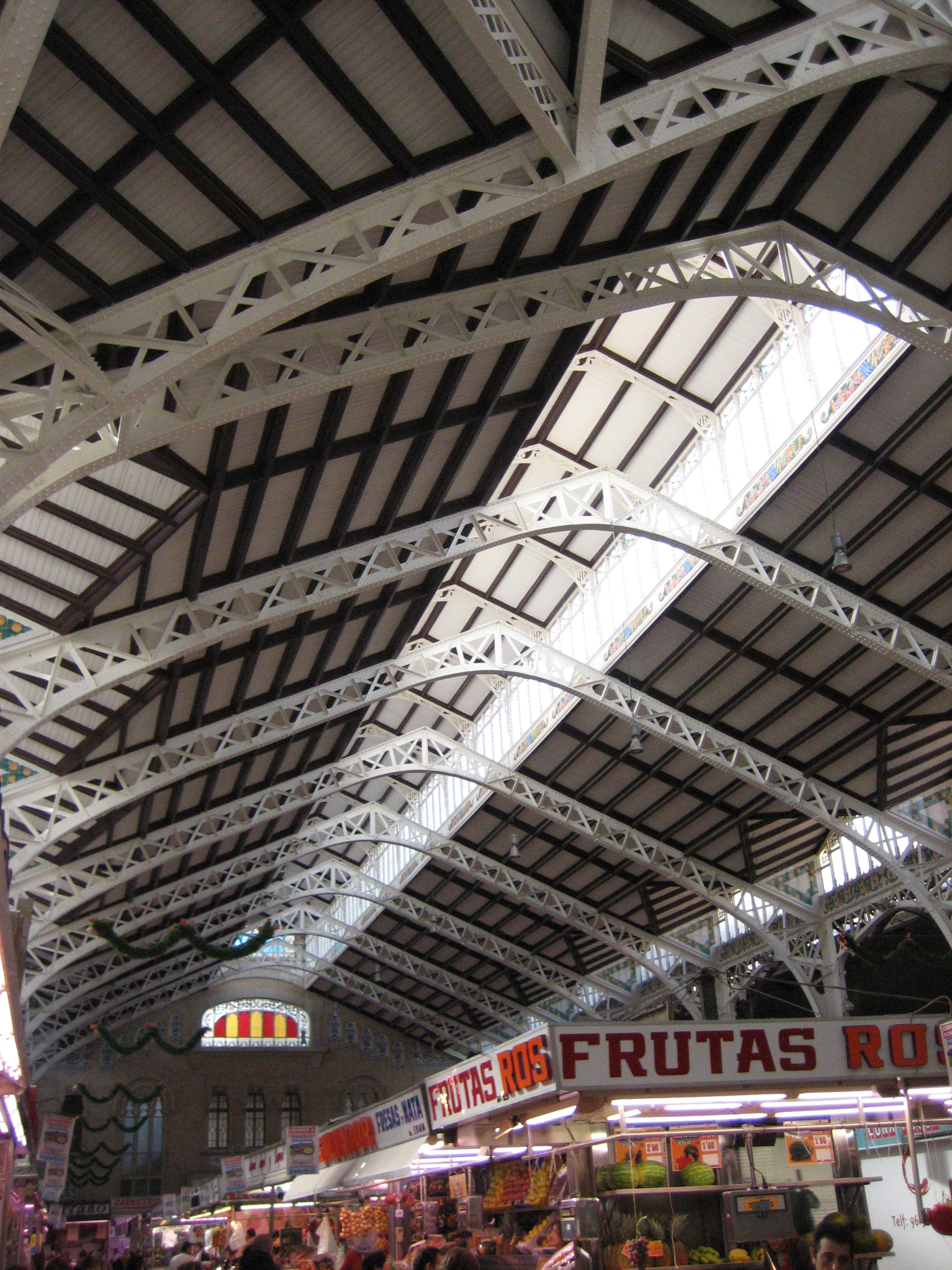 Interior do mercado.